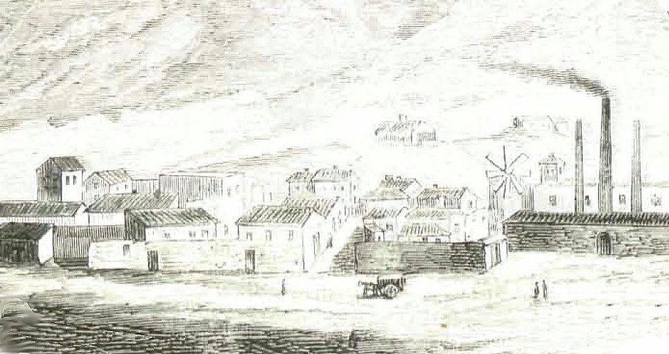 Bolivia. Vista de Tocopilla al pie de los Andes.